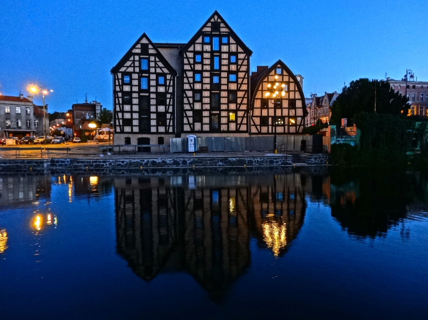 Spichrze nad Brdą w Bydgoszczy, zbud. w latach 1793-1800, od 1964 r. w gestii Muzeum Okręgowego